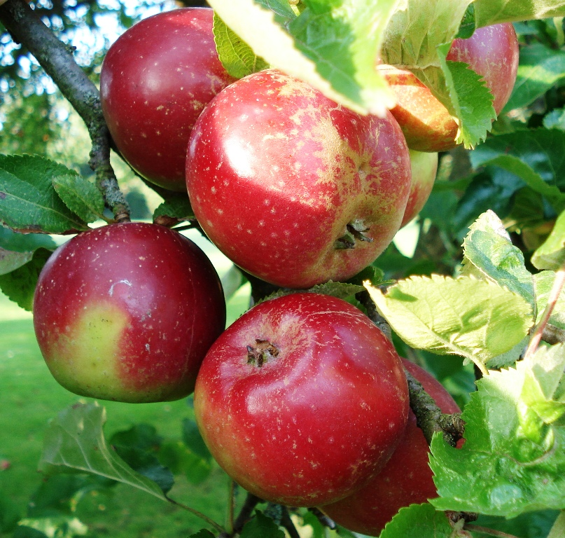 Apfel Roter Pariner (am Baum)